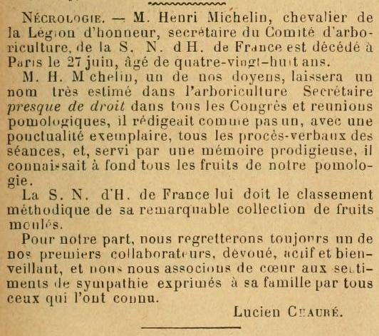 Lucien Chauré und Otto Ballif: Le Moniteur d'horticulture. Organge des amateurs de jardins et d'orchidées. Fondé en 1877 par Jean Chauré. Rédigé par une Société d'Horticulteurs, d'Arboriculteurs et d'Amateurs distingués sous la direction de M. Lucien Chauré. Band 22, 1898, S. 149. Nachruf. - Herr Henri Michelin, Ritter der Ehrenlegion, Sekretär des Ausschusses für Baumzucht, der S. N. d. H. de France starb am 27. Juni im Alter von achtundachtzig Jahren in Paris. Herr H. Micheilin, einer unserer Dekane, wird einen sehr geschätzten Namen im Baumschulsekretariat hinterlassen, fast zu Recht in allen Kongressen und pomologischen Versammlungen, er schrieb wie kein anderer, mit beispielhafter Pünktlichkeit, alle Protokolle der Versammlungen, und, gedient von einer wunderbaren Erinnerung, kannte er bei Coud alle Früchte unserer Pomologie. Das S. N. d'H. de France verdankt ihm die methodische Klassifizierung seiner bemerkenswerten Sammlung von Fruchtmahlsteinen. Wir unsererseits werden immer einen unserer ersten Mitarbeiter vermissen, der engagiert, aktiv und wohlwollend ist, und wir verbinden uns herzlich mit den Zeitpunkten der Sympathie, die alle, die ihn kannten, seiner Familie gegenüber zum Ausdruck bringen. Lucien Chauré.